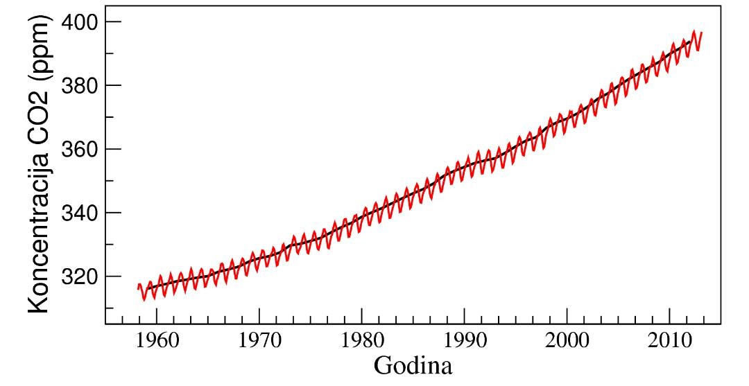 Српски (ћирилица): Koncentracija CO2 u periodu od 1960. do februara 2013. godine, izmerena na stanici Mauna Loa, na Havajima.